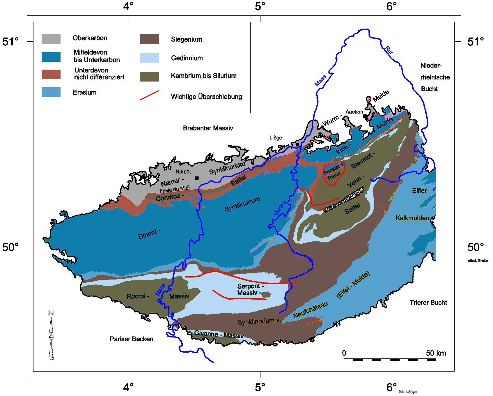 Geologische Karte der Ardennen mit Benennung der Großstrukturen nach Walter 1992.